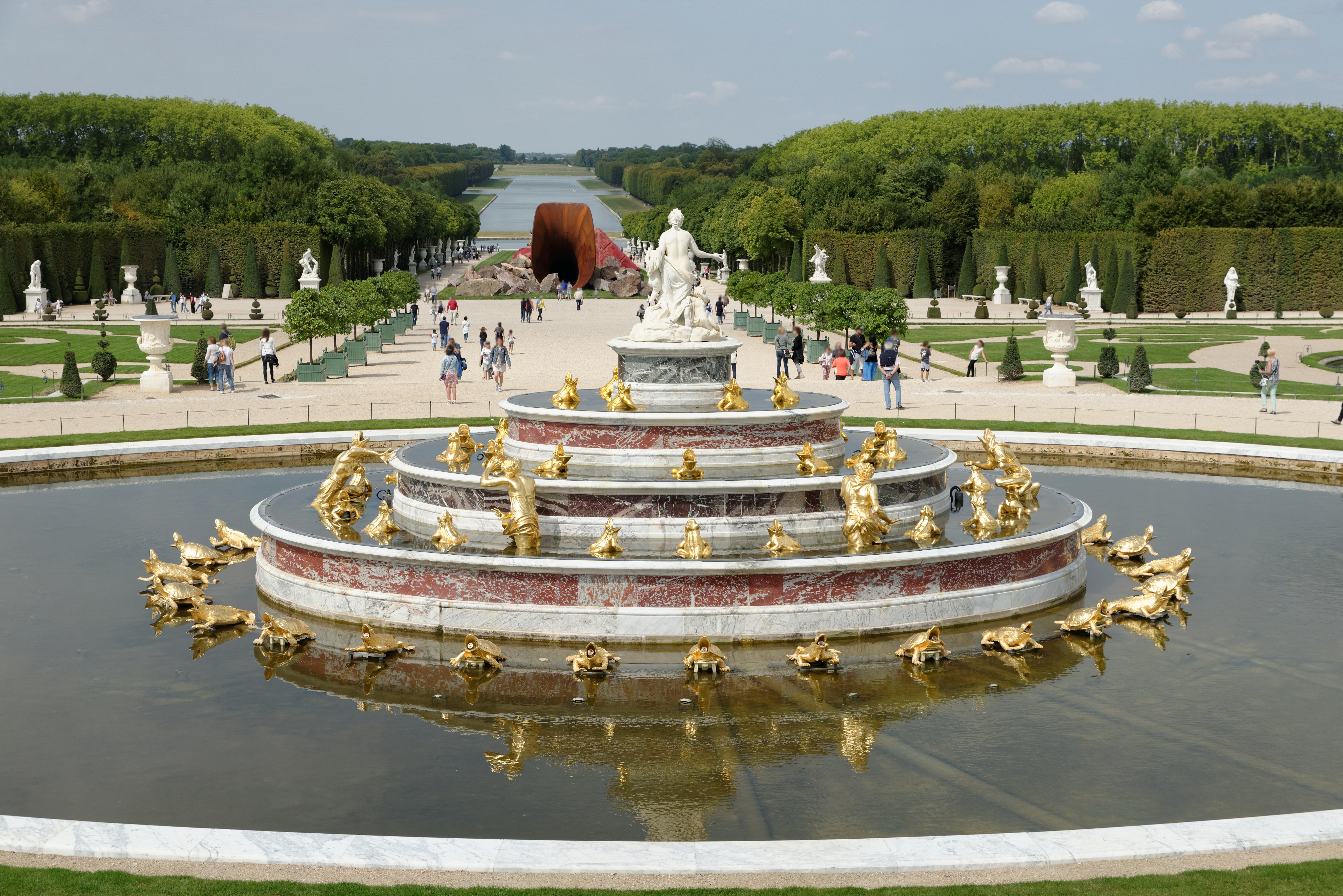 Bassin de Latone dans le parc du château de Versailles (Yvelines, France).